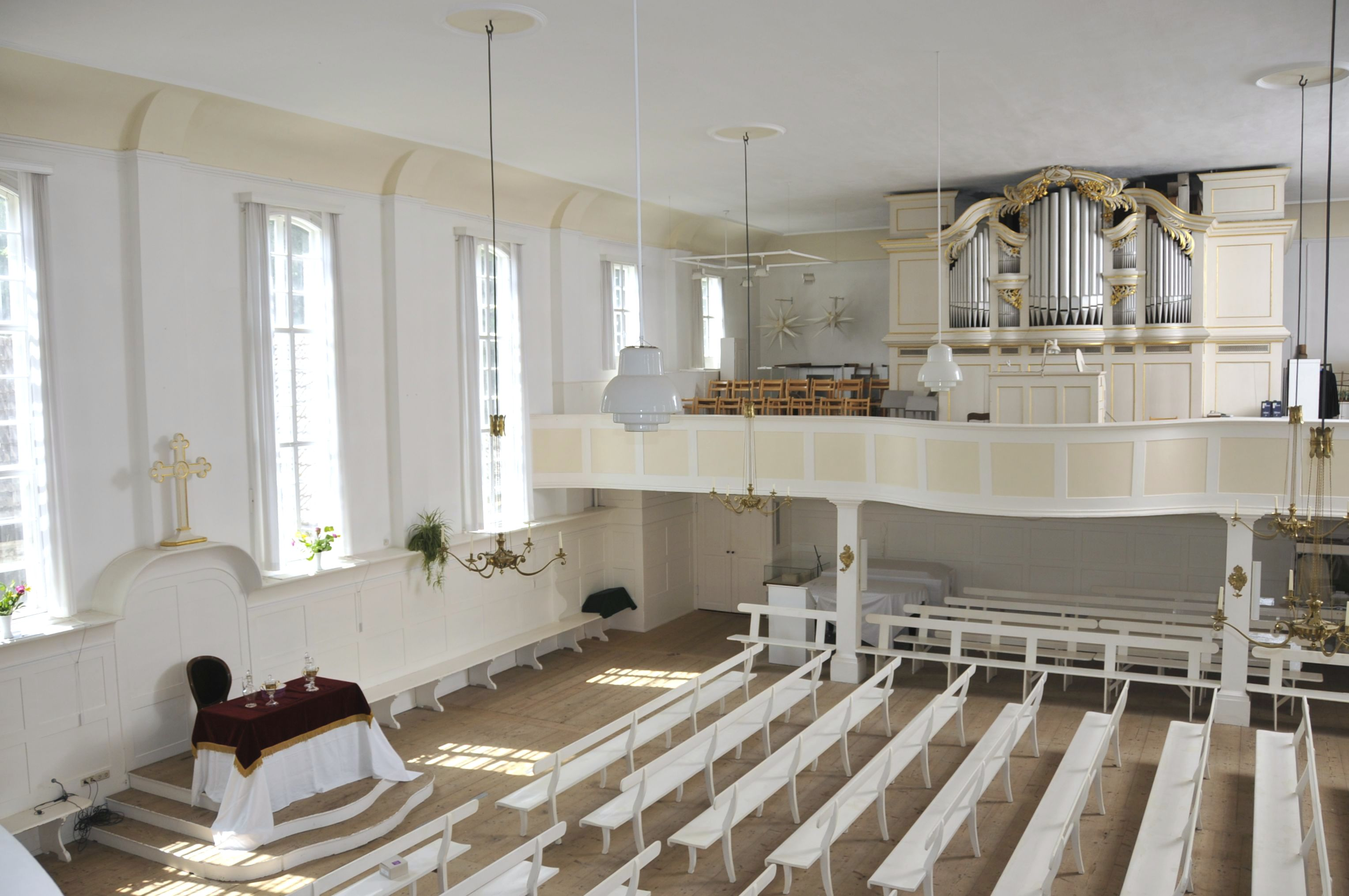 Inneres der ev. Brüderkirche in Neudietendorf